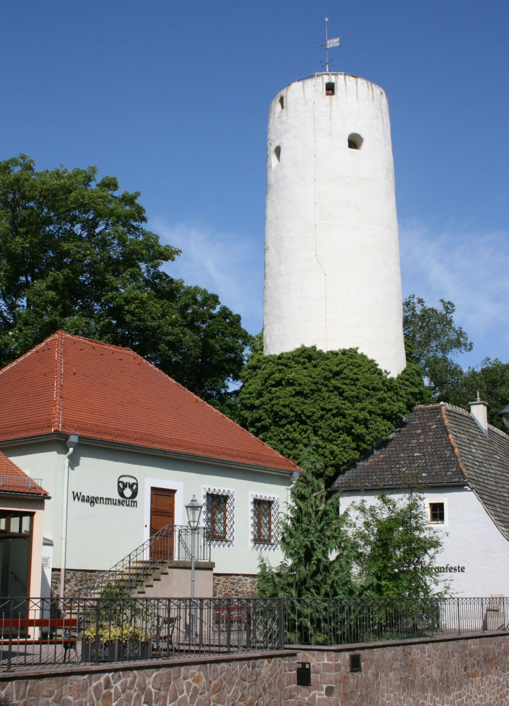 Waagenmuseum Oschatz mit Wachturm